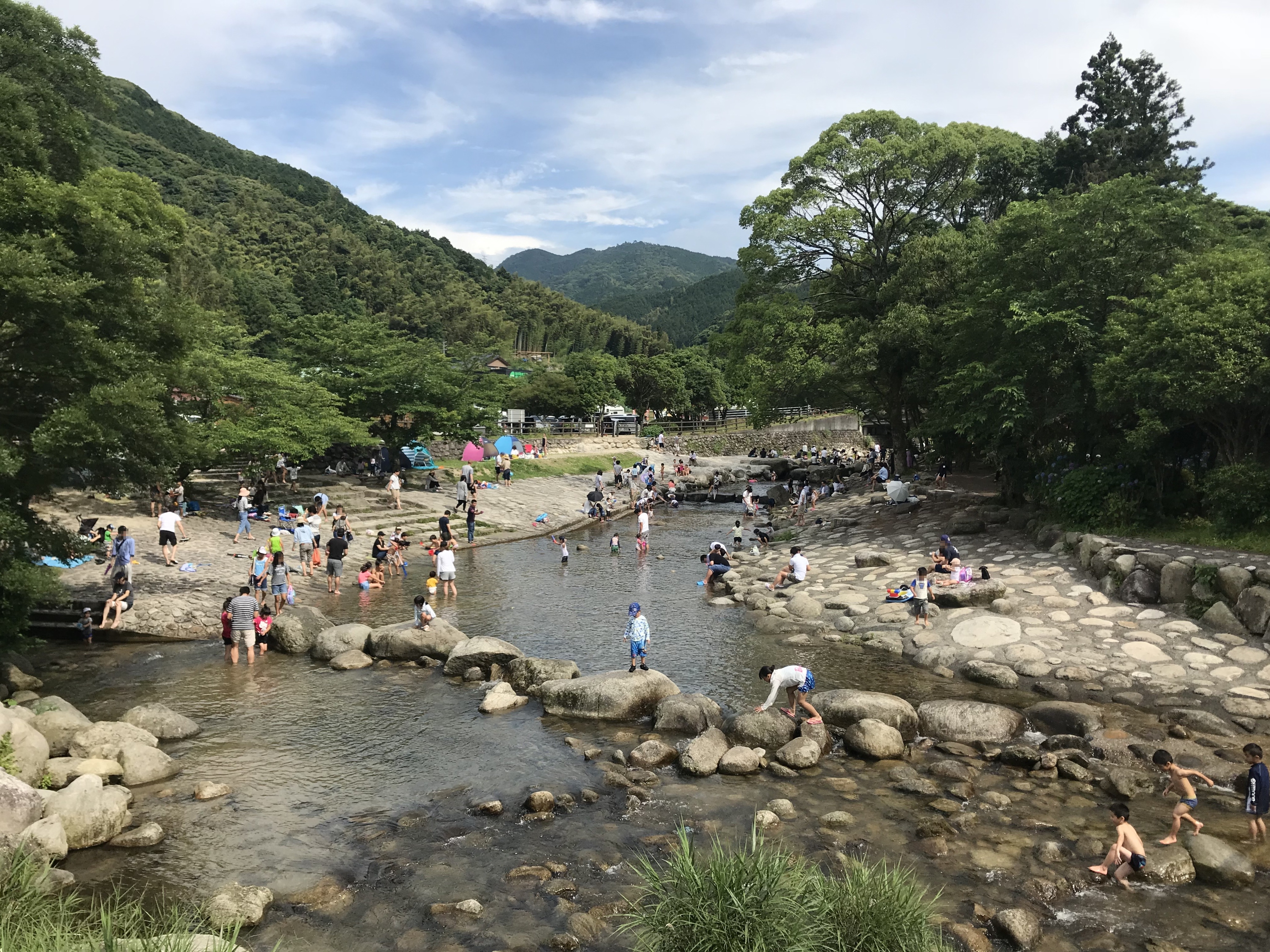 四季彩橋より望む中ノ島公園のじゃぶじゃぶ河原